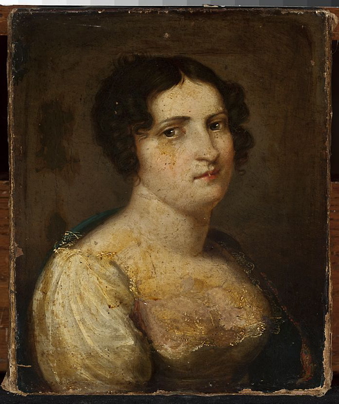 Партрэт Ганны з Пучынскіх (1789-1868), другой жонкі Яна Рустэма